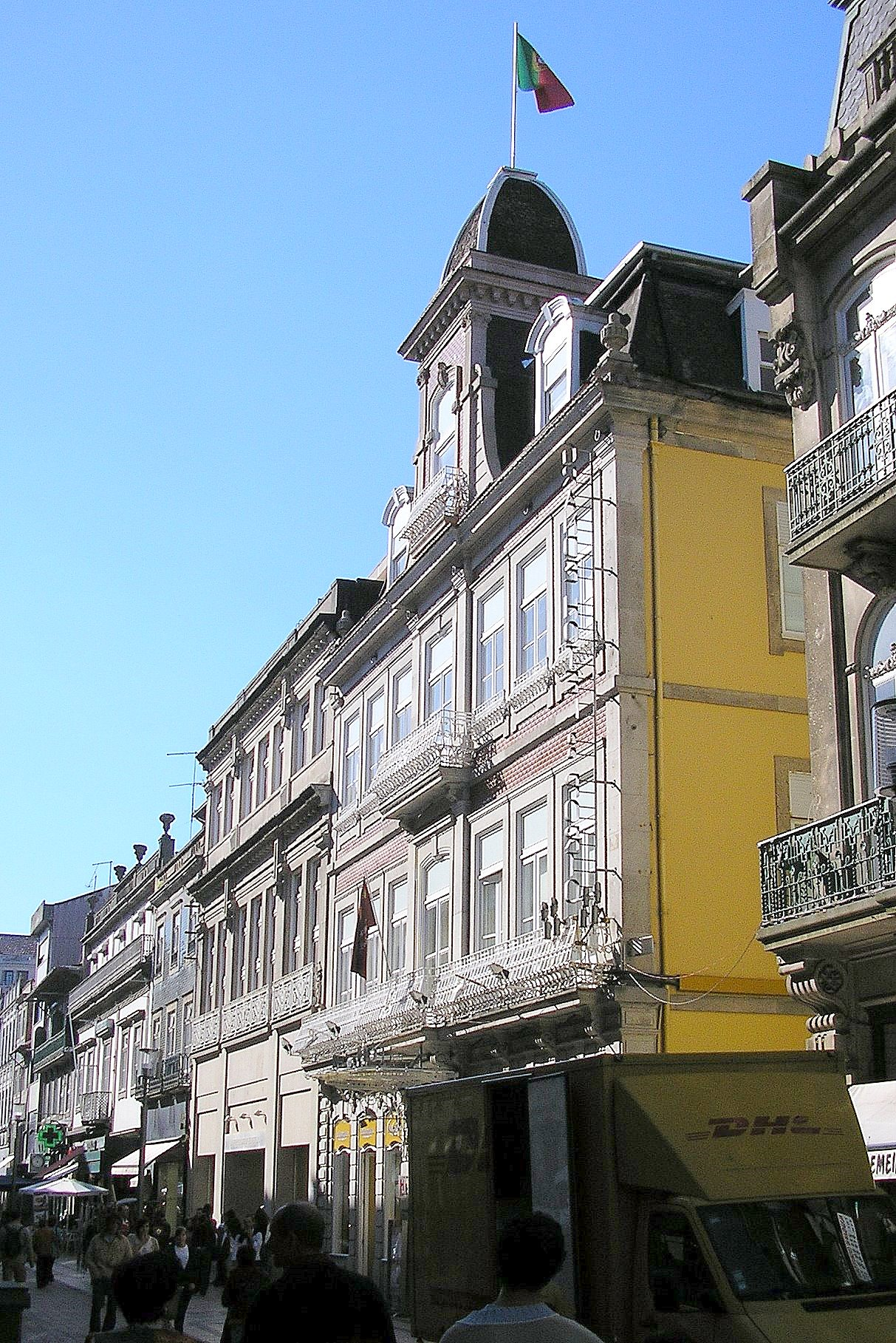 "Grande Hotel do Porto", Portugal